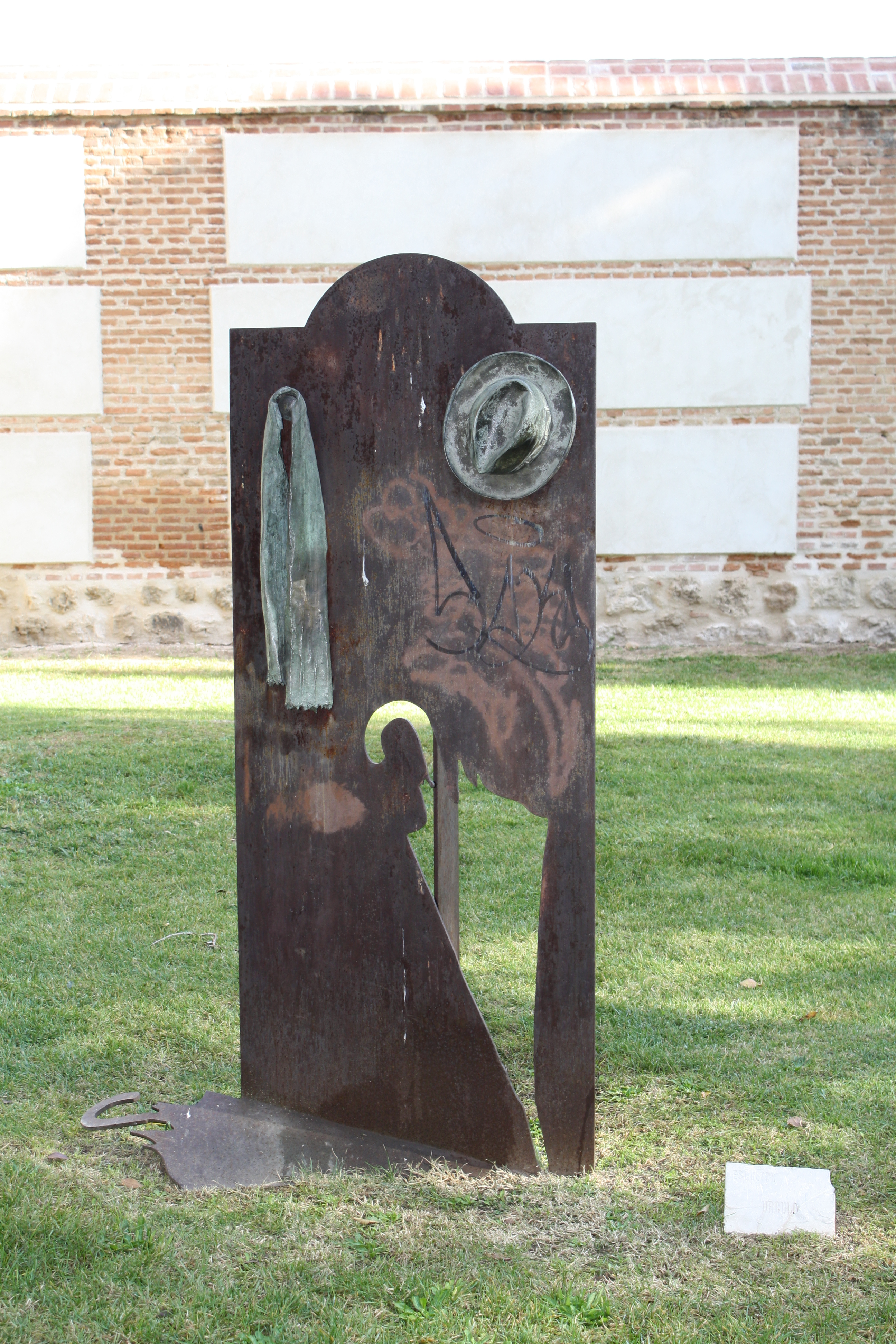 Museo de Escultura al Aire Libre de Alcalá de Henares (Comunidad de Madrid - España). Escultor: Úrculo.